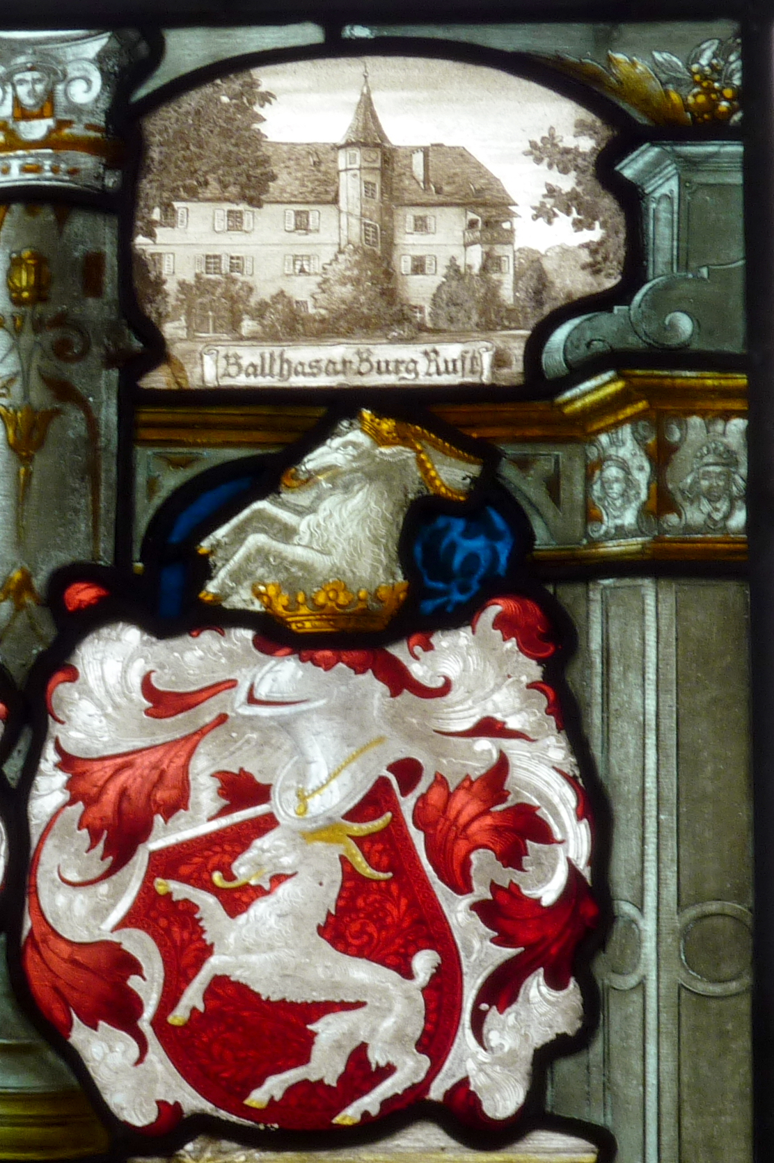 Romanische Kirche St. Nikolaus in Kloster Zella, einem Ortsteil von Rodeberg im Unstrut-Hainich-Kreis (Thüringen), Bleiglasfenster (Ausschnitt) mit Wappen von Böcklin von Böcklinsau und der Balthasarburg bei Rust